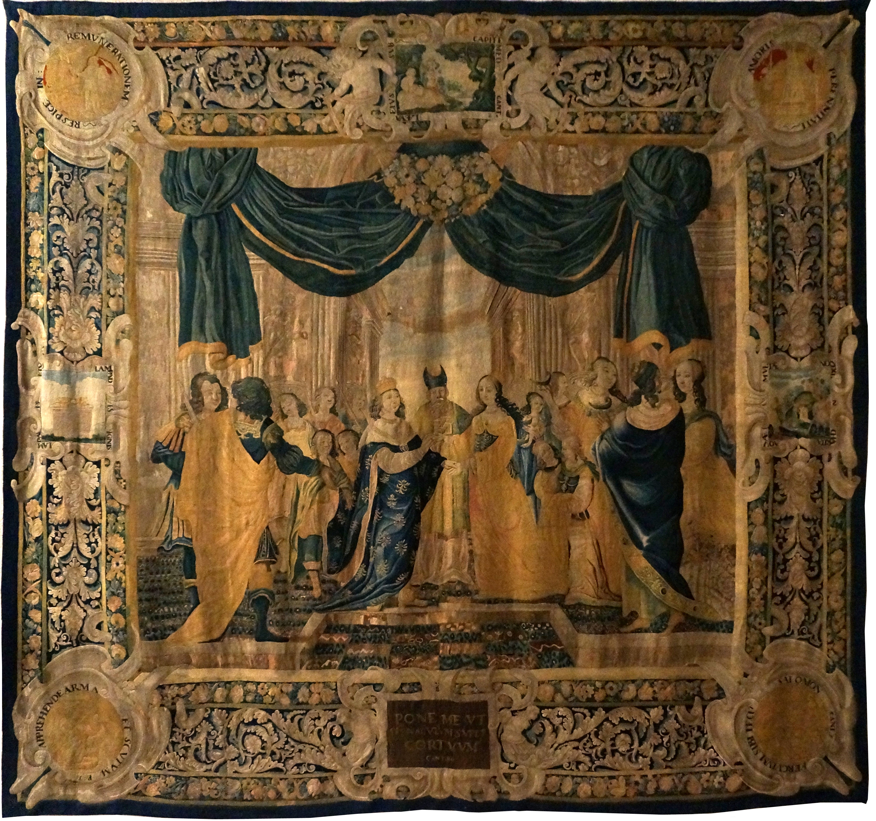 Fabrication française de la fin du XVIIe siècle, provient du château d'Hauteville dans l'Aisne. Sur le thème du Cantique des cantiques.